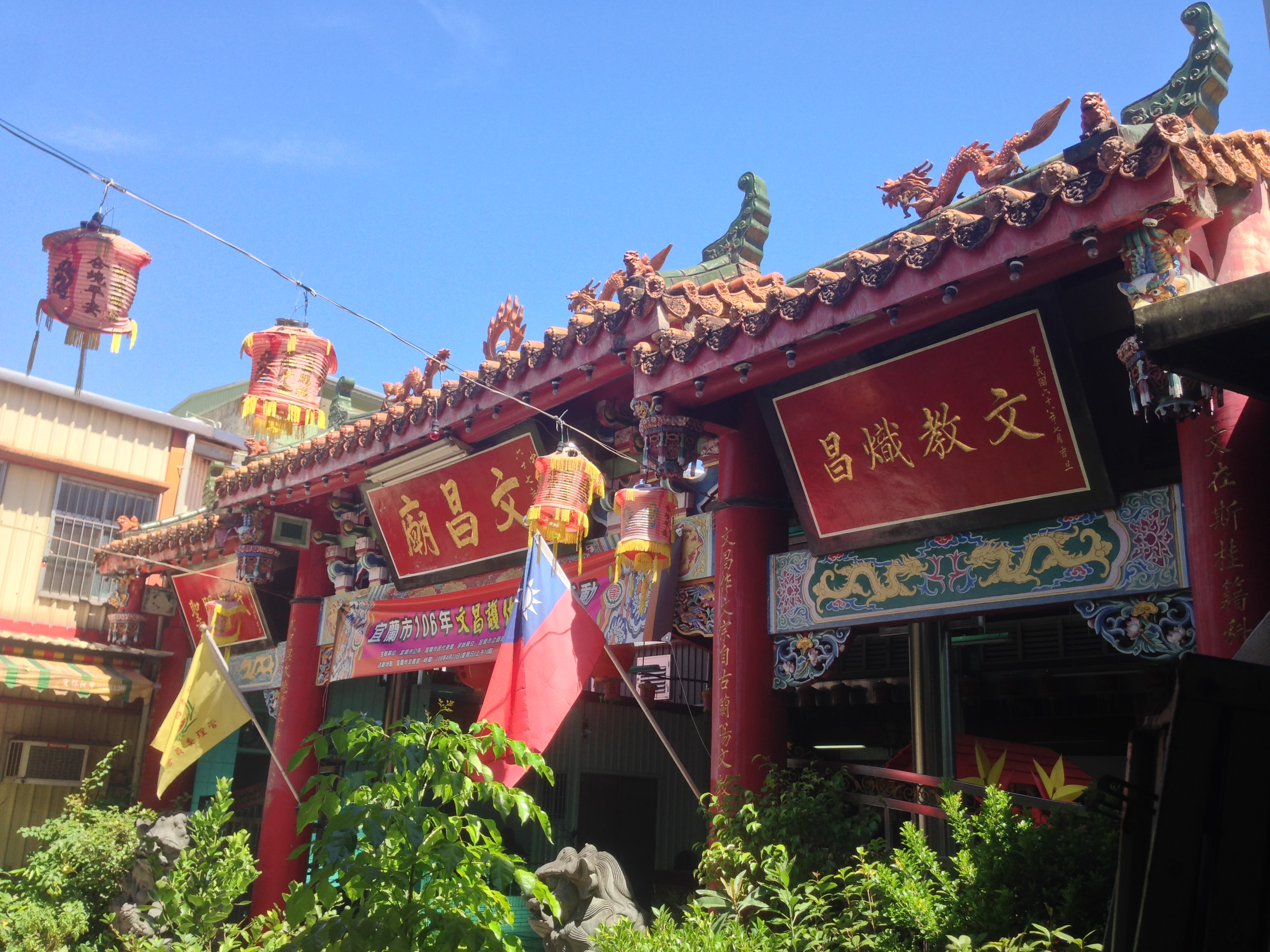 中文（台灣）: 宜蘭文昌廟一景